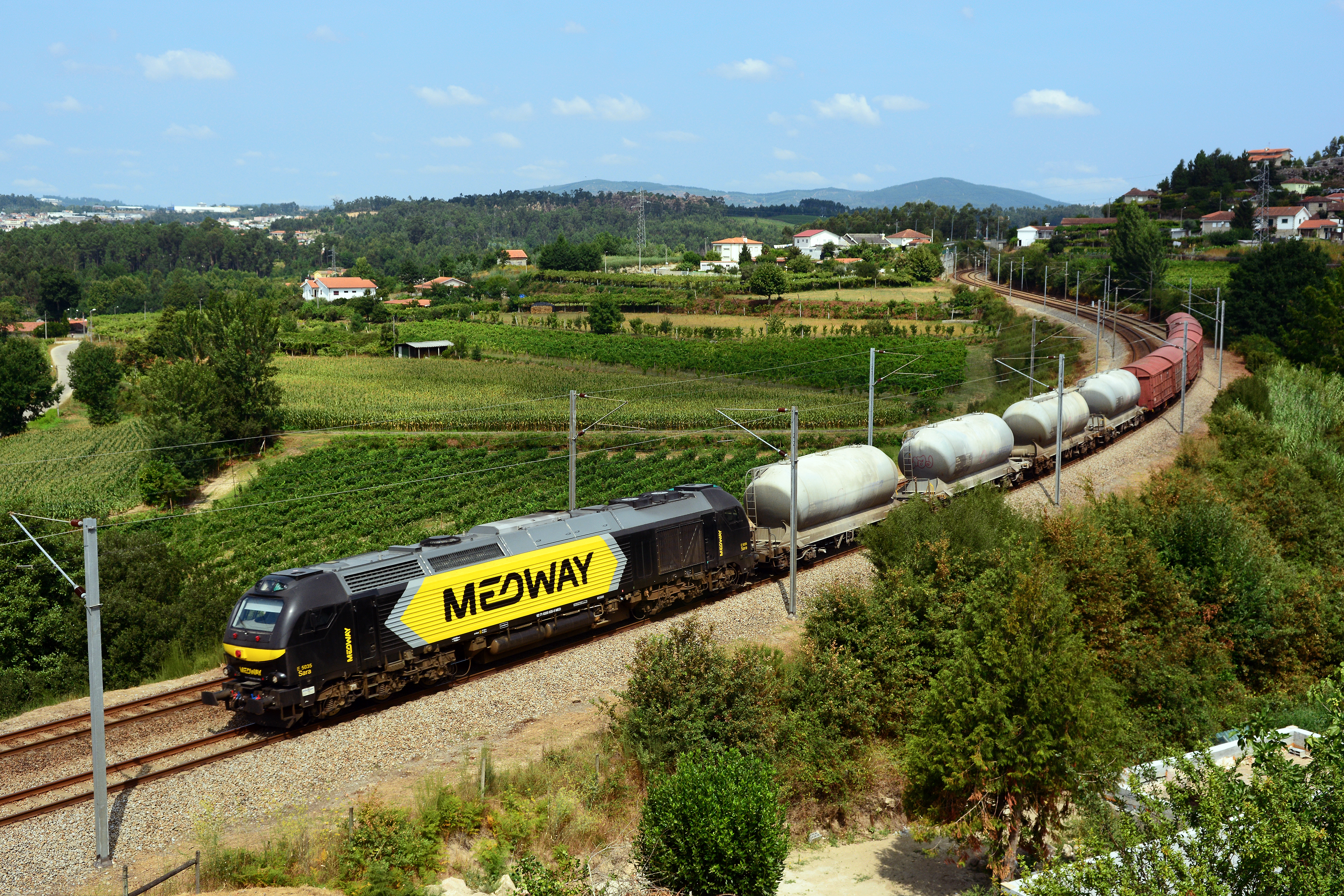 Cimento vazio Godim - Gaia Devesas